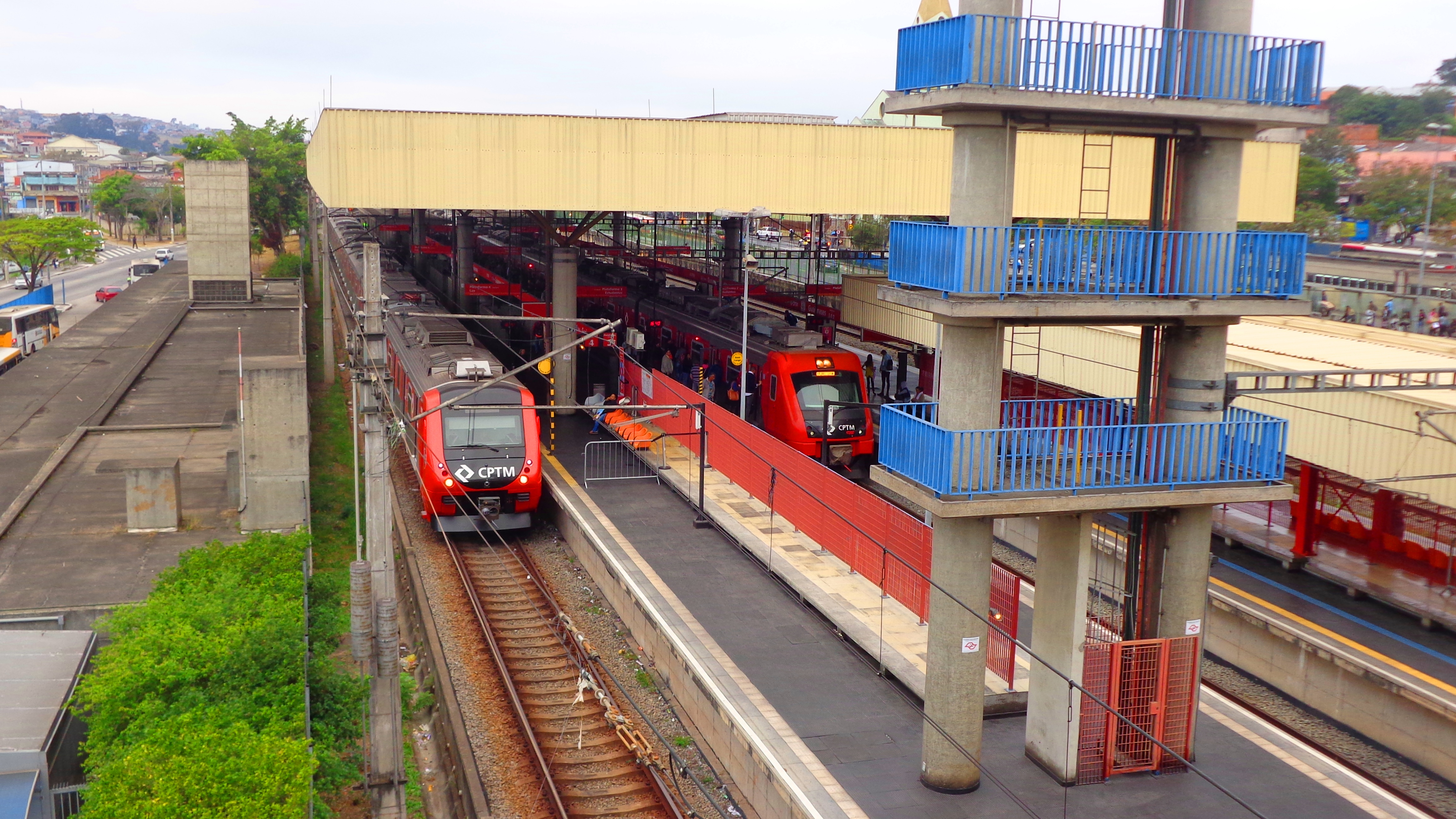 Imagem da Estação de Guaianazes da CPTN